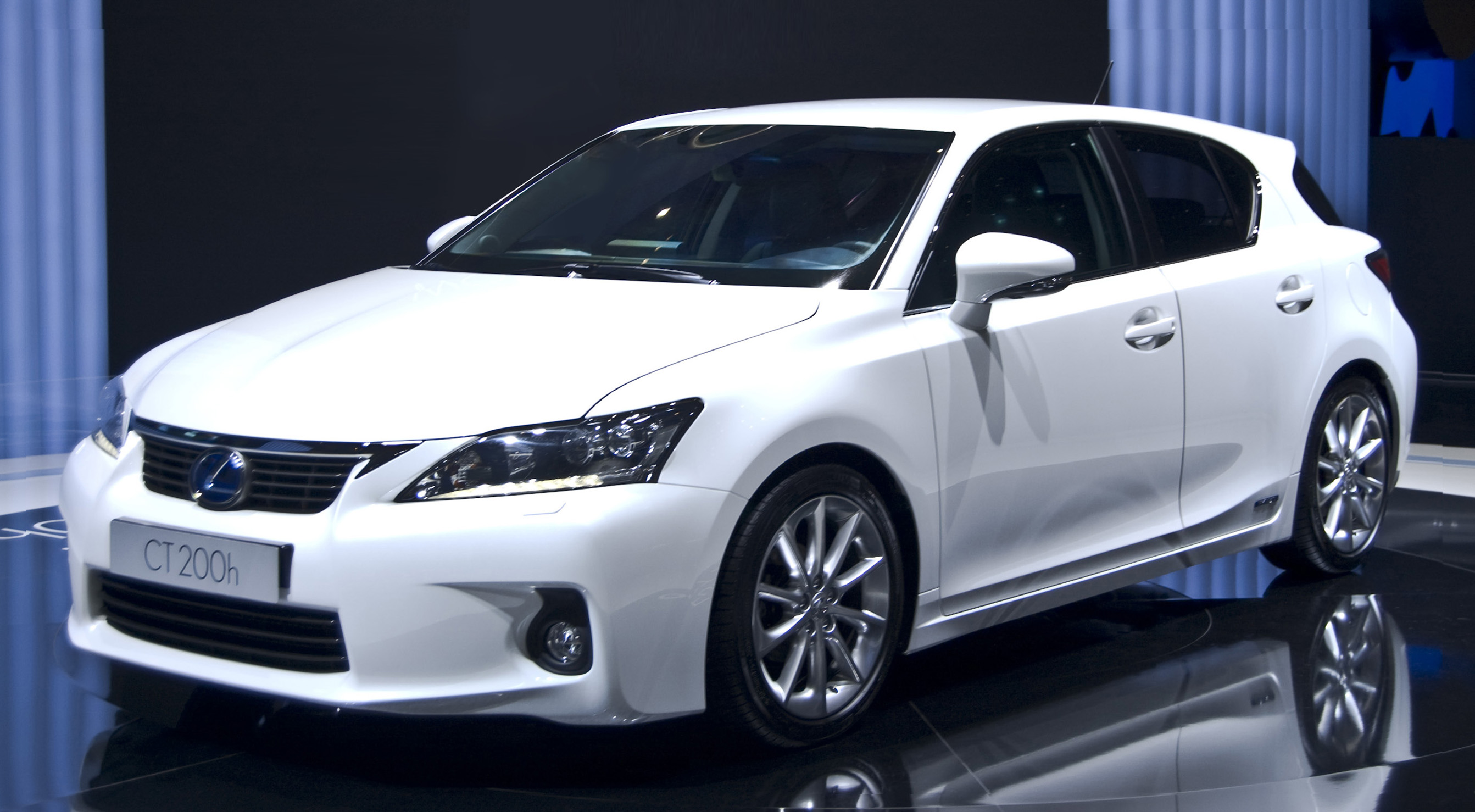 Lexus CT200h en el Salón de Ginebra 2010.